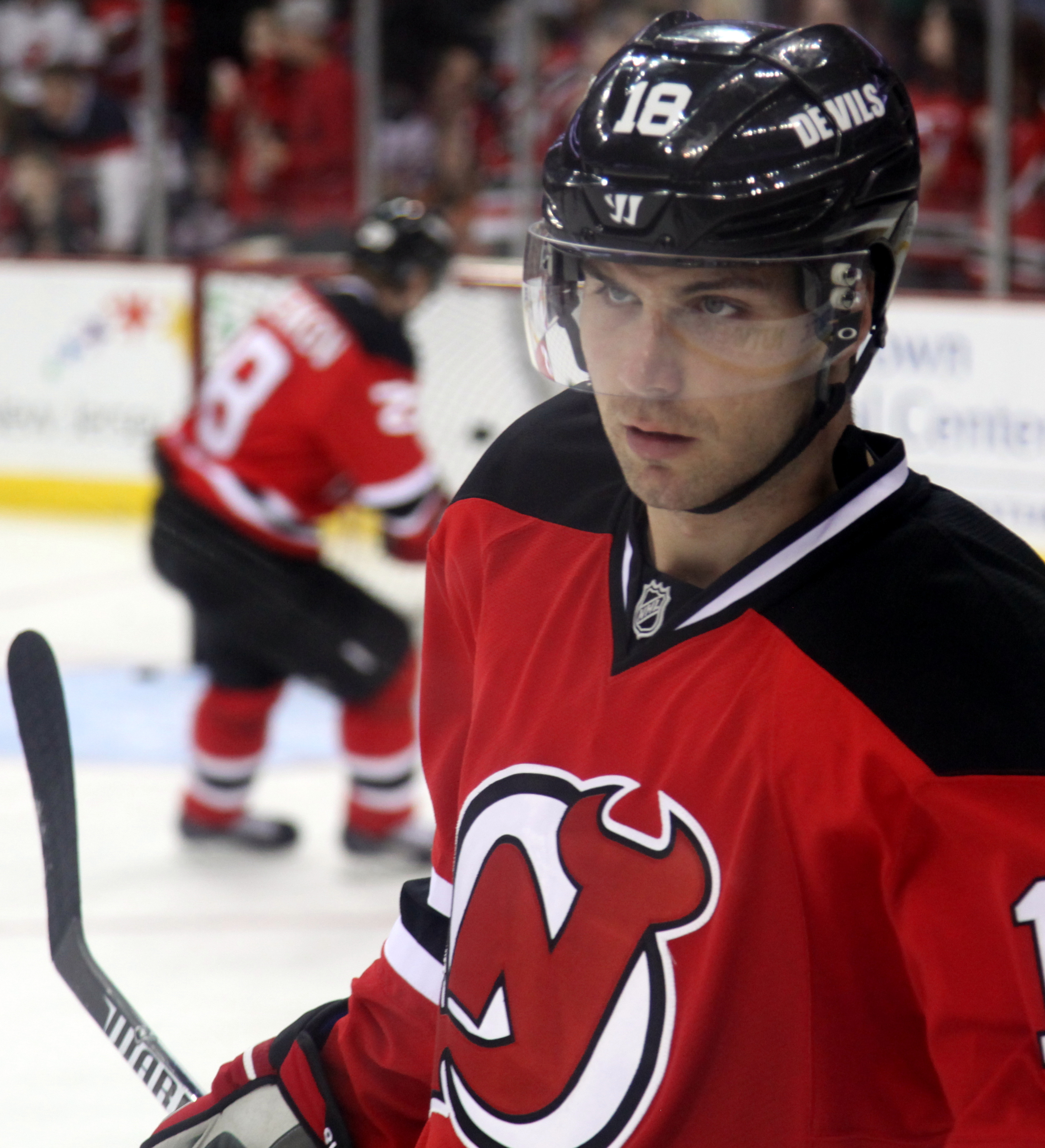 Steve Bernier in April 2014.